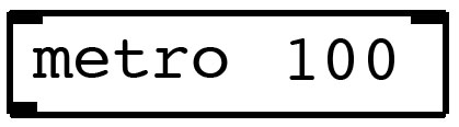 Metro